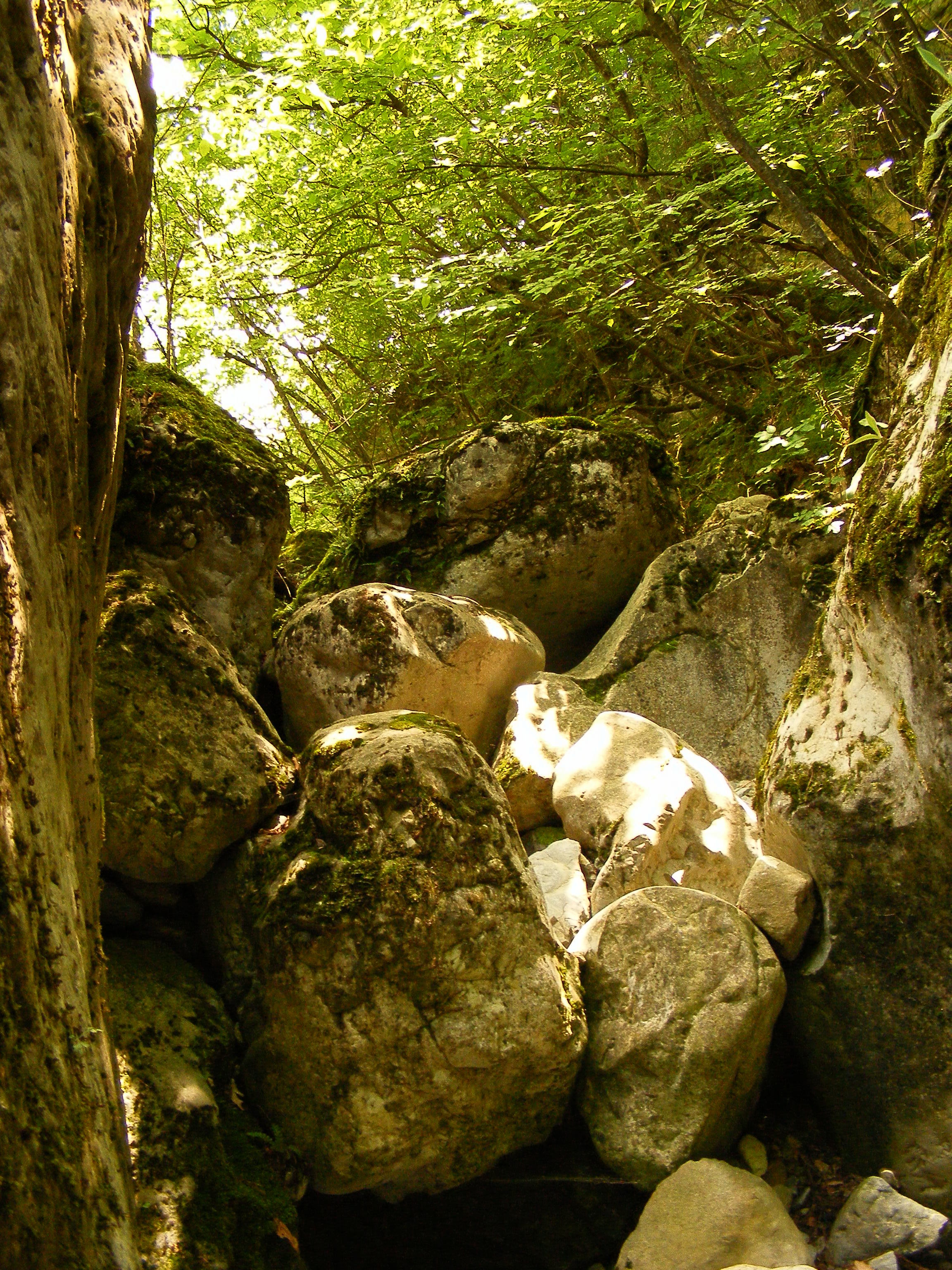 Каньонът на река Шегава при прехода от село Буново до село Раждавица